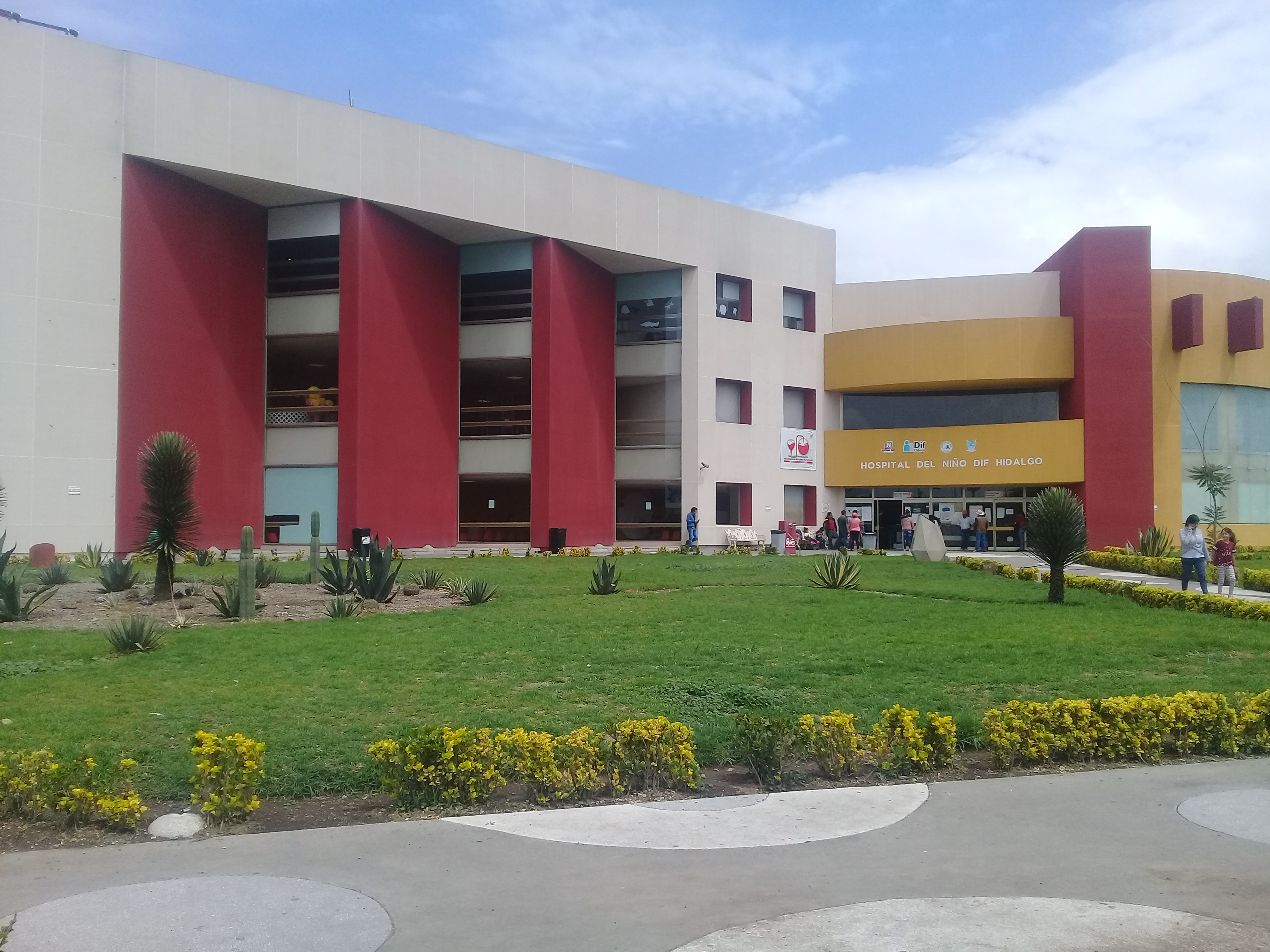 Hospital del Niño DIF María Elena Sañudoen Pachuca de Soto, México. Inaugurado el 25 de marzo de 2010 en un terreno de 36 000 m2 (13 400 m2 de construcción).